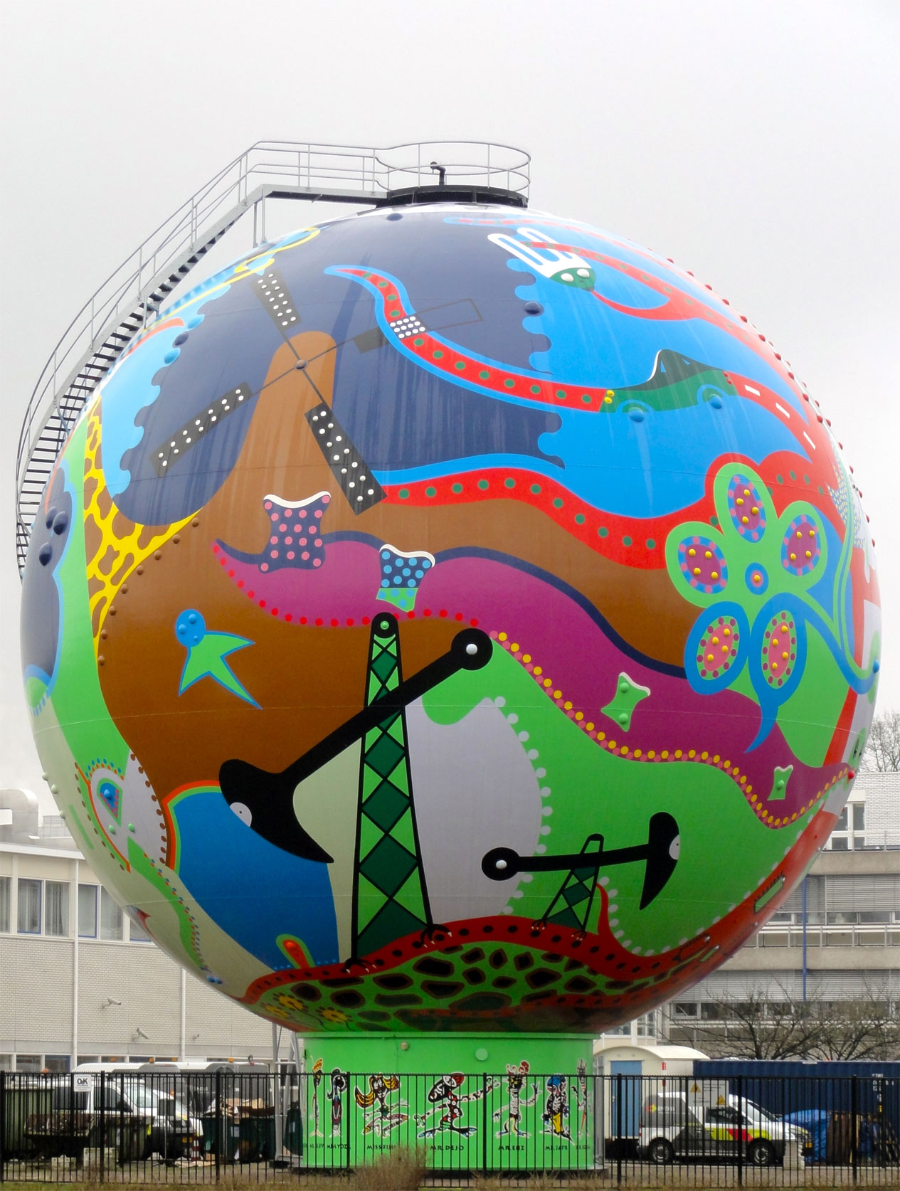 Leven met energie door de Toyisten Dordsestraat te Emmen